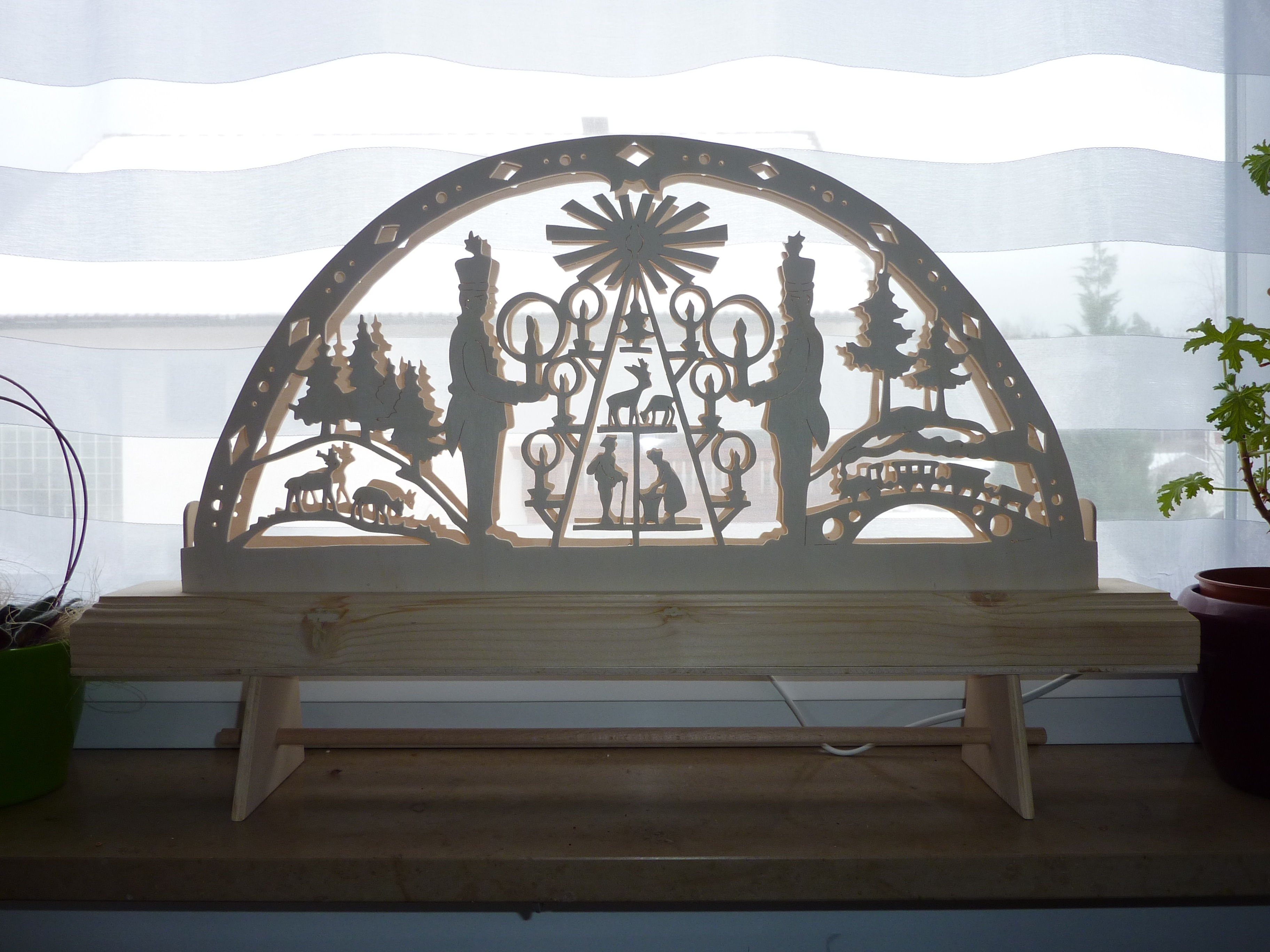 Schwibbogen bei Tageslicht